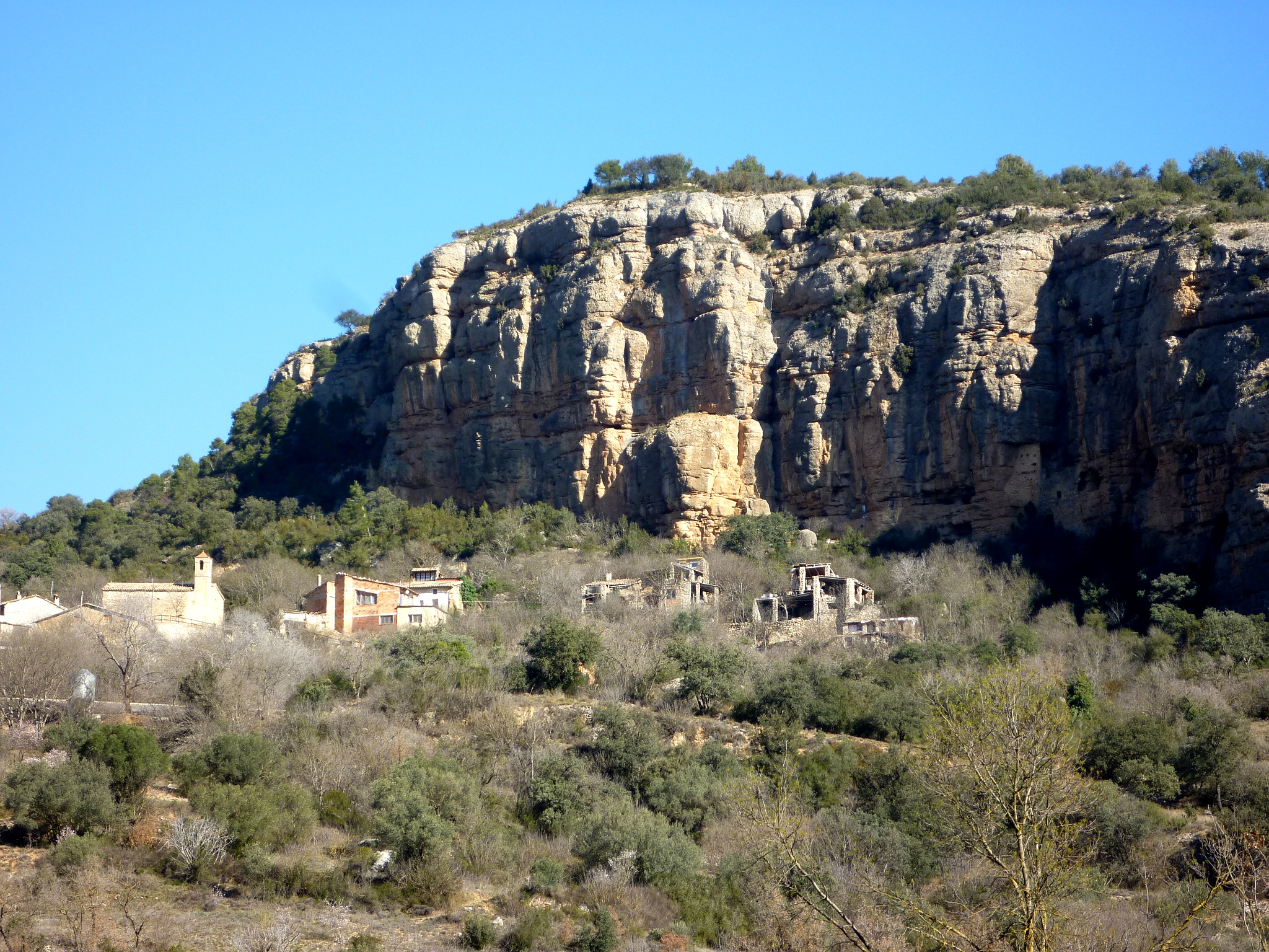 La Clua amb el seu castell a la dreta de la foto (Artesa de Segre)